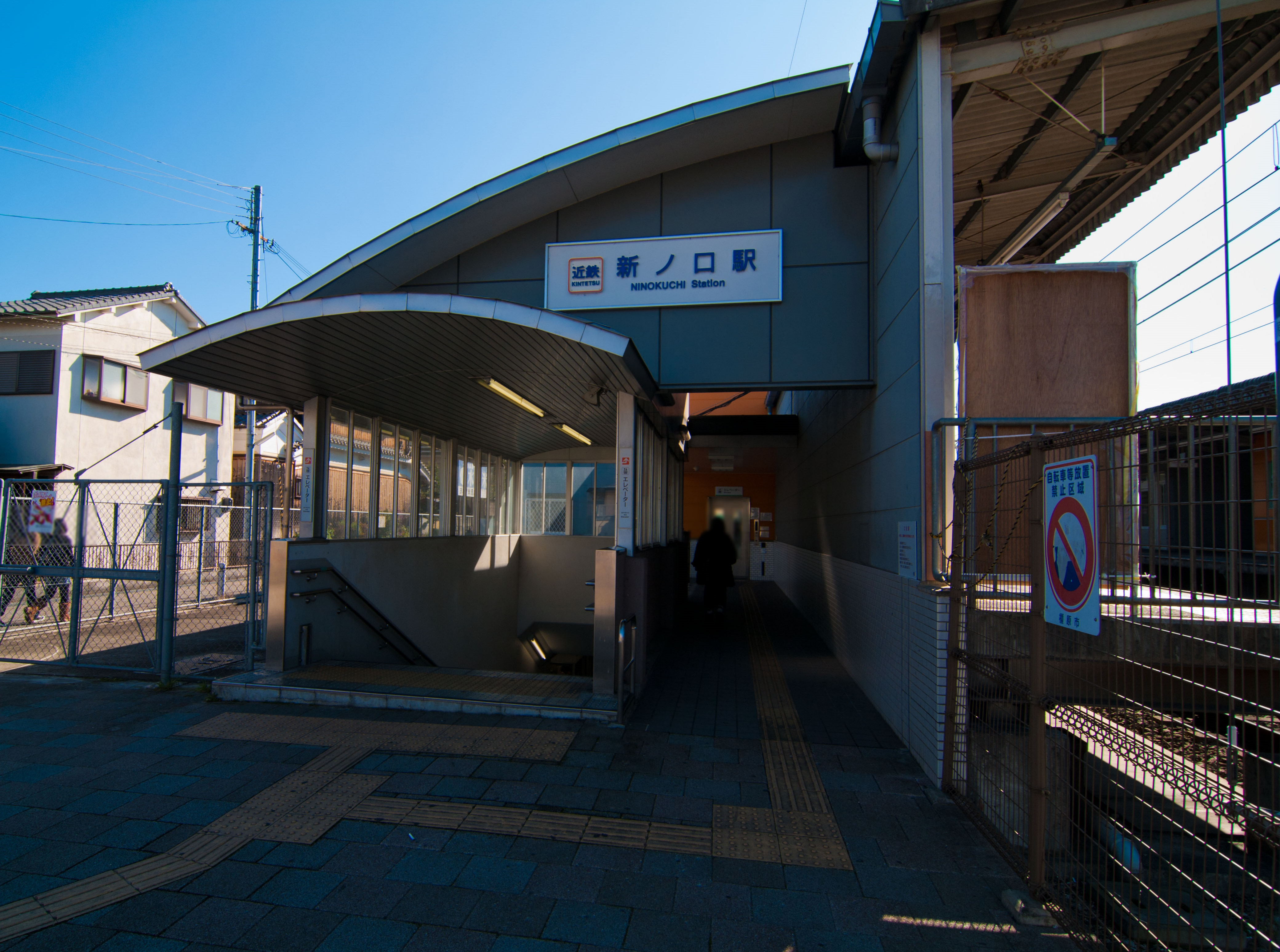 近鉄橿原線新ノ口駅駅舎